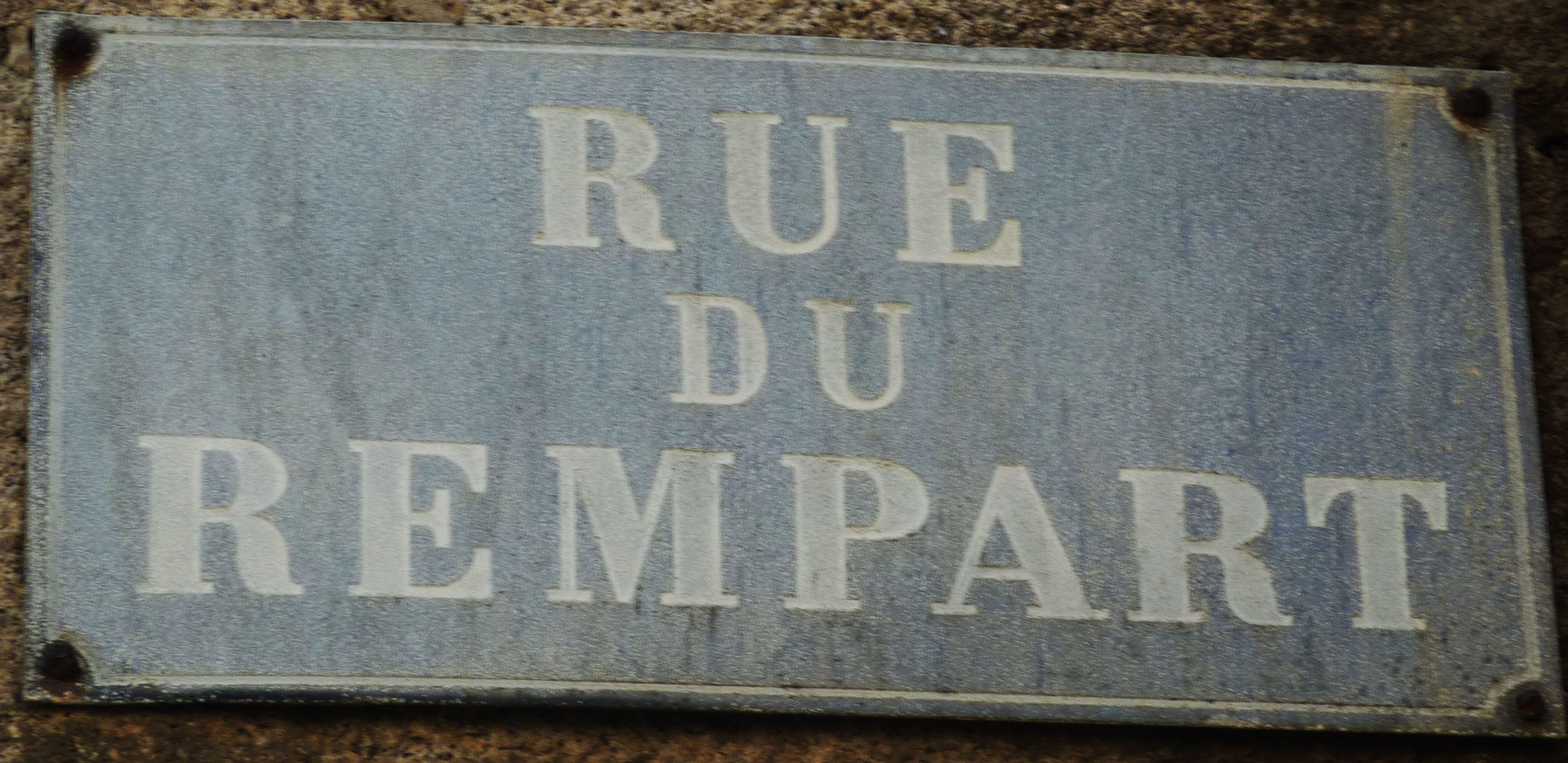 Brest Recouvrance : la "rue du Rempart" est une des rares traces subsistantes des anciennes fortifications côté Recouvrance